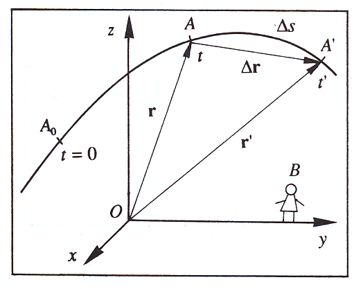 Partikula puntualaren higiduraren elementuak